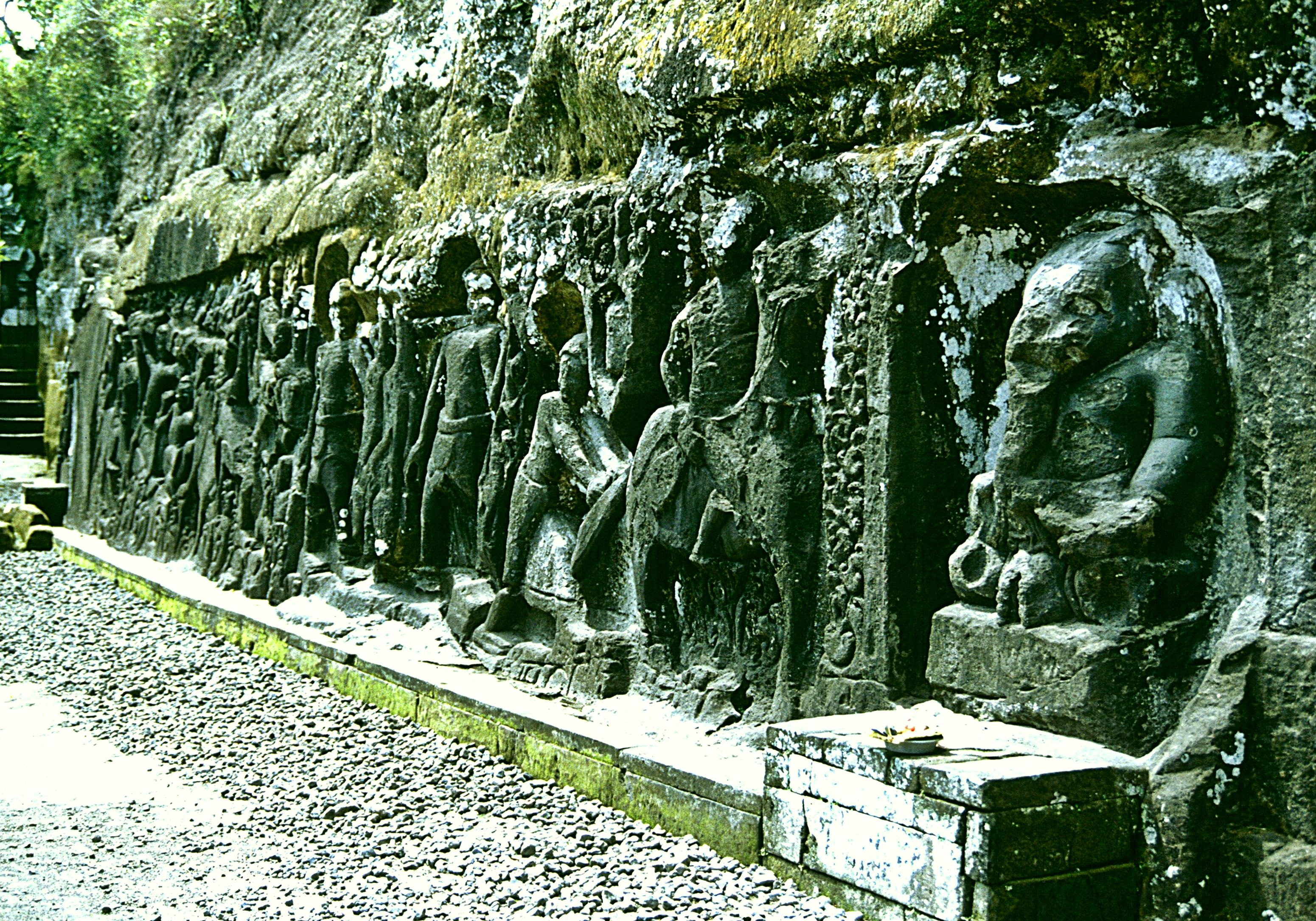 Yeh Pulu Felsrelief